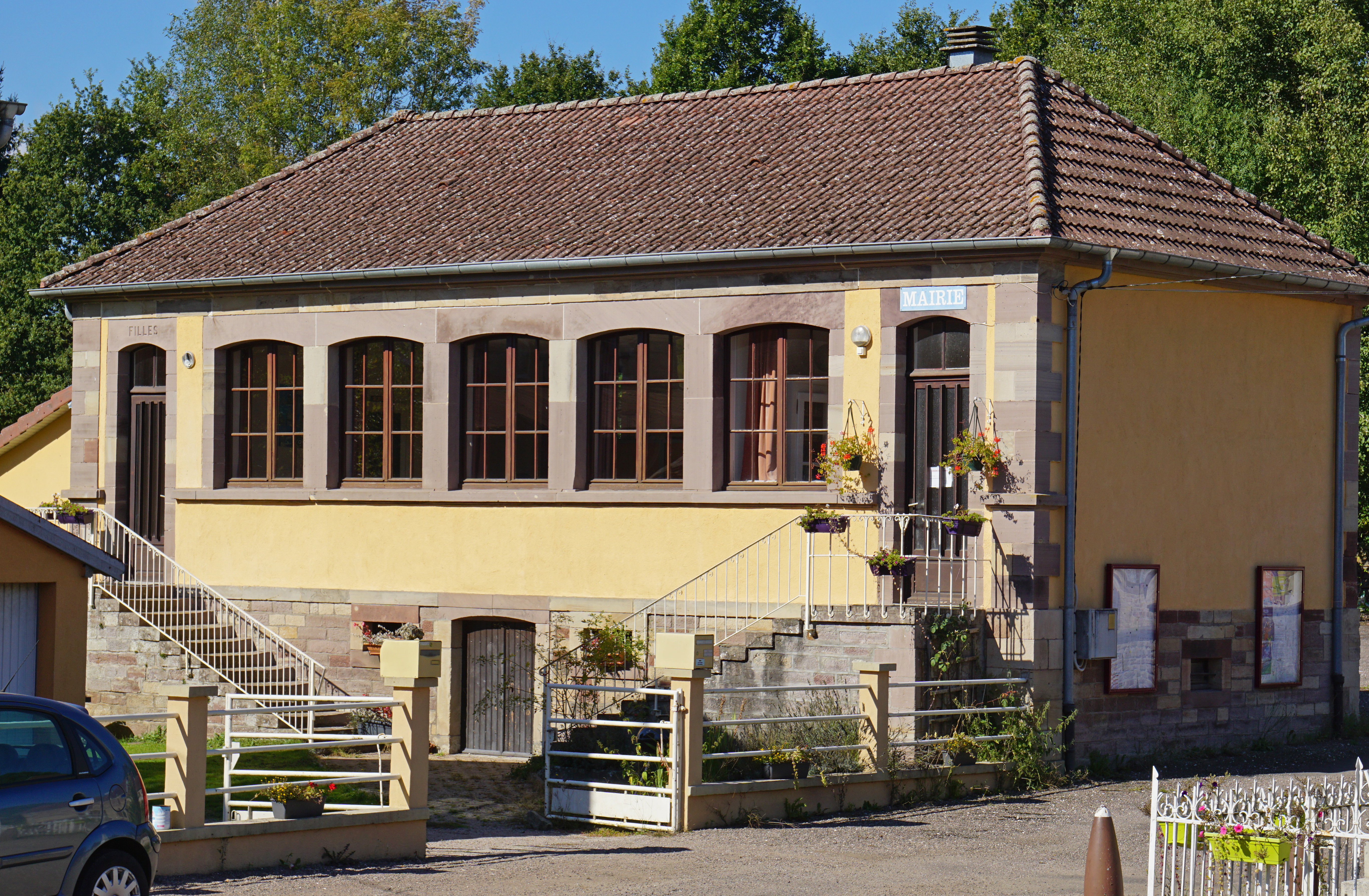 La mairie de Rignovelle (installée dans l'ancienne école).